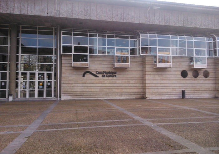 Exterior de la Casa Municipal de Cultura de Avilés. Vista desde la Plaza Álvarez Acebal.